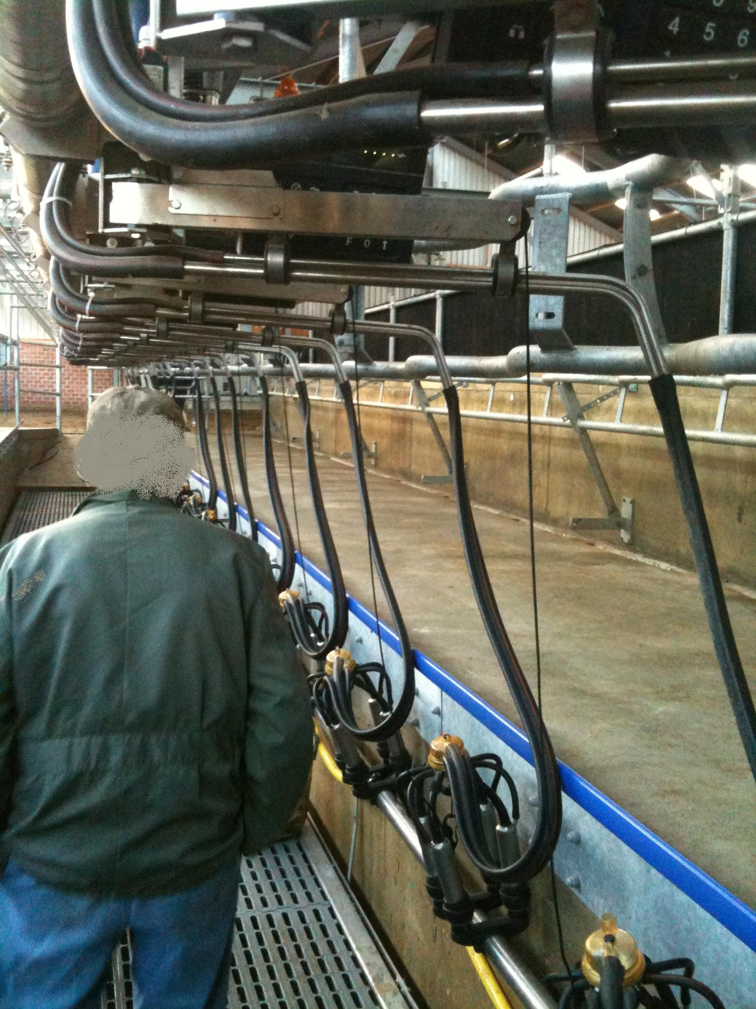 Swing Over Melkstand je 20 Kuhplätze je Seite